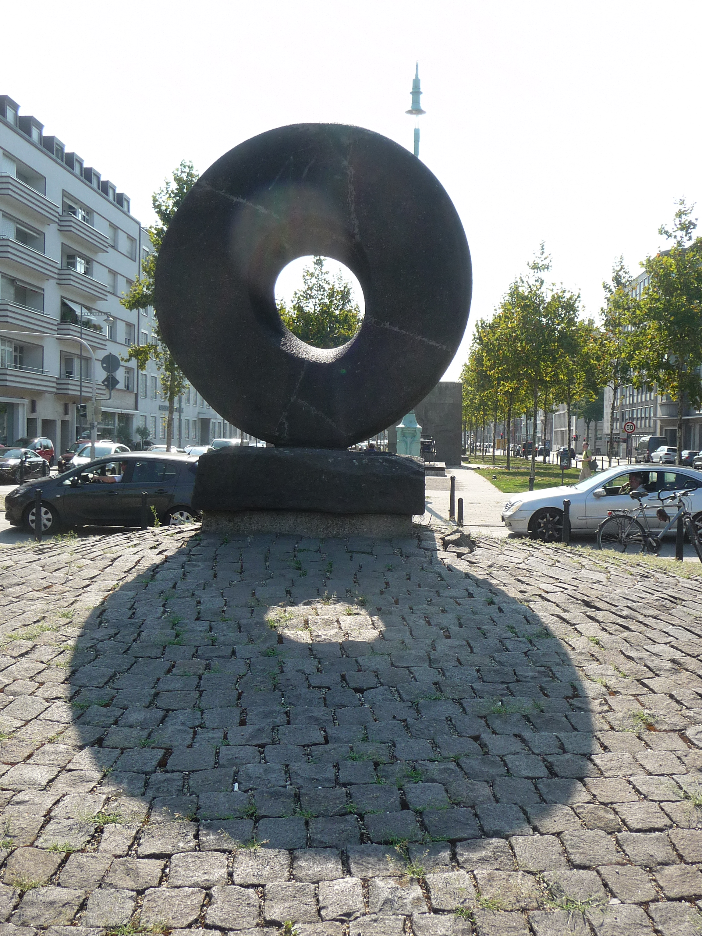 Fünfzehn Jahre lang meditierte der Bildhauer Morice Lipsi. Dann hatte er die Idee des Lipsi-Rads, das er als selbst als Höhepunkt seines Schaffens betrachtete. Die Stadt Mannheim kaufte das Rad 1964 aus Lipsis Ausstellung in der Kunsthalle für 60.000 DM. 1965 wurde es an der Carl-Diehm-Halle aufgestellt und bekam den Spitznamen “Mühlrad”. Vier Jahre später fuhr es in Lastwagenfahrer um. Seitdem hat das Rad Bruchstellen. Nach der Reparatur wurde das Rad an der Kunsthalle aufgestellt. 1975 bekam es seinen heutigen Platz.